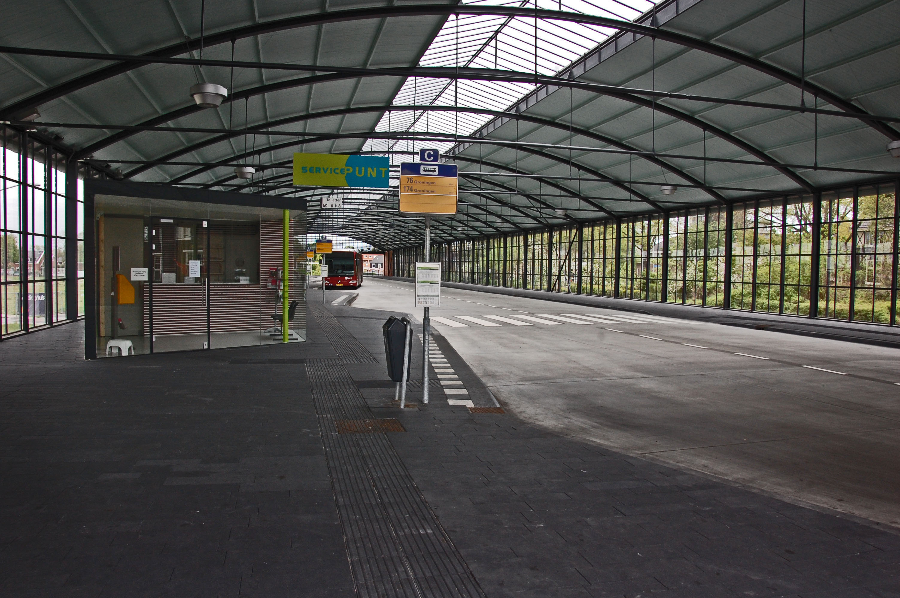 Busstation van Station Veendam in Nederland